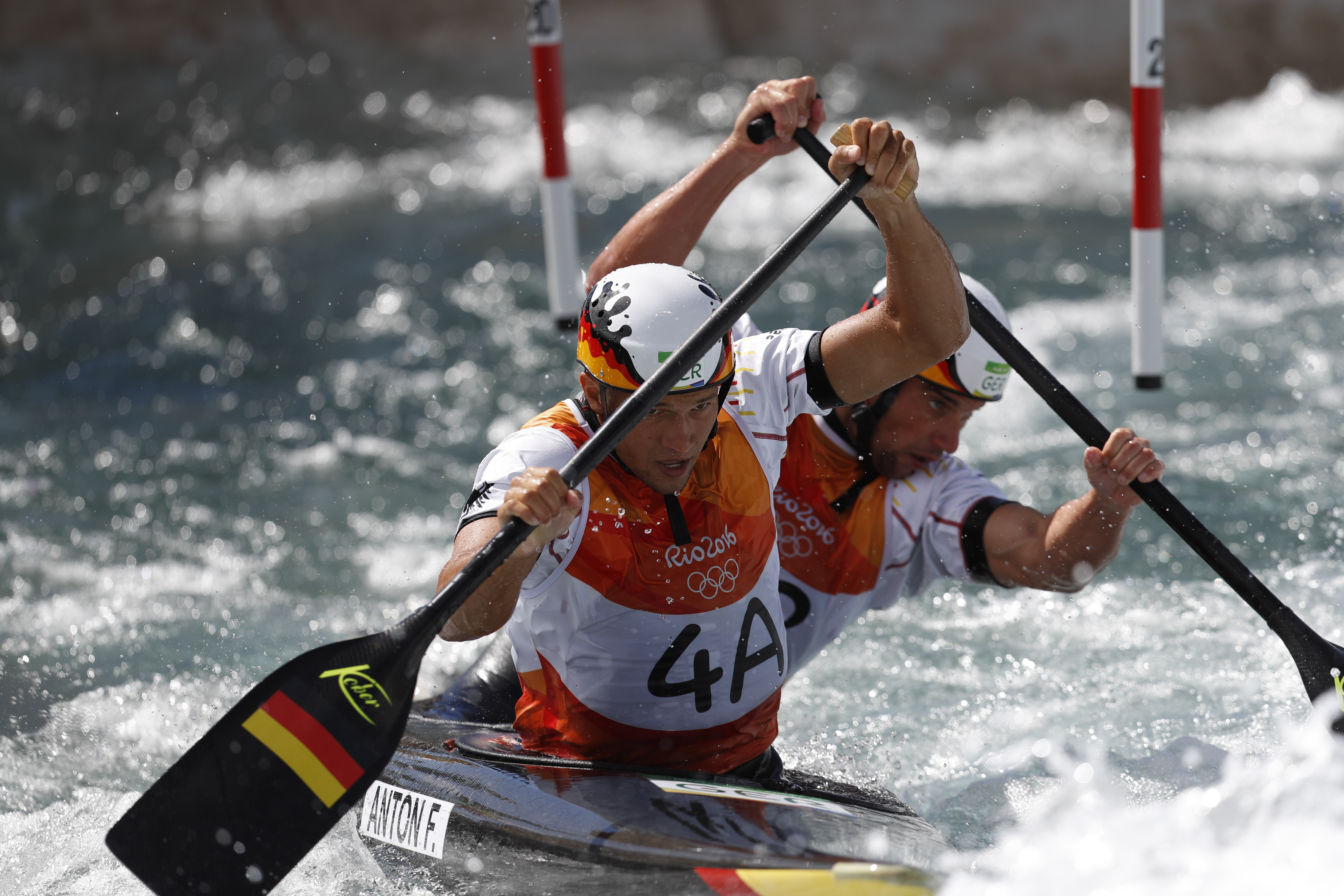 Rio de Janeiro - Alemães Franz Anton e Jan Benzien disputam canoagem slalom categoria C2 nos Jogos Olímpicos Rio 2016 no X Park em Deodoro (Fernando Frazão/Agência Brasil)